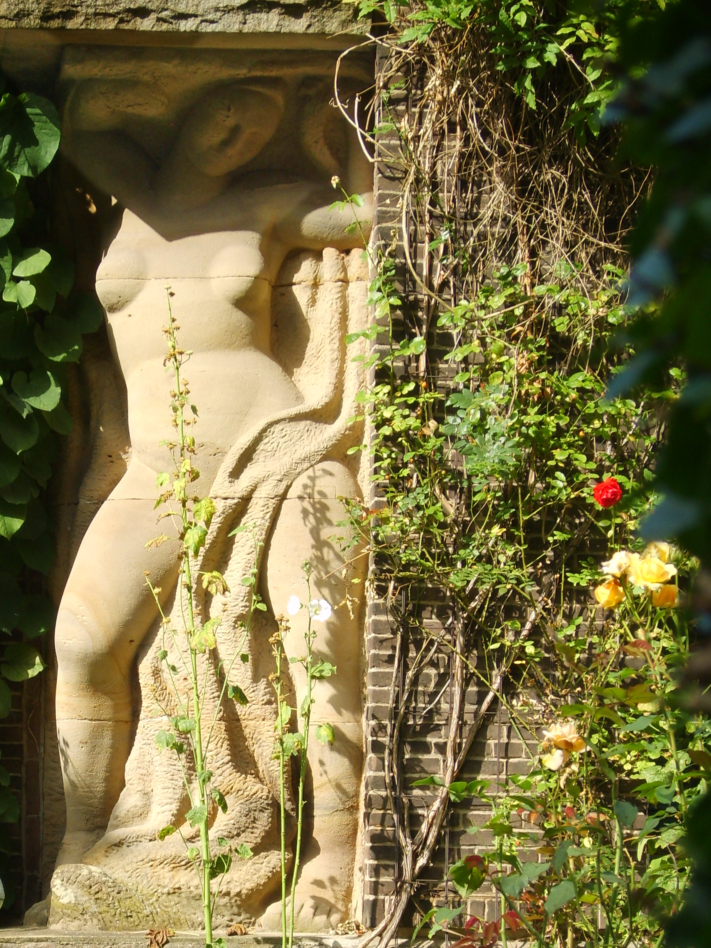 Gartenstadt Hohenhagen, Milly Steger: Karyatide an ihrem Hagener Wohnhaus in der Zeit von 1912–1917